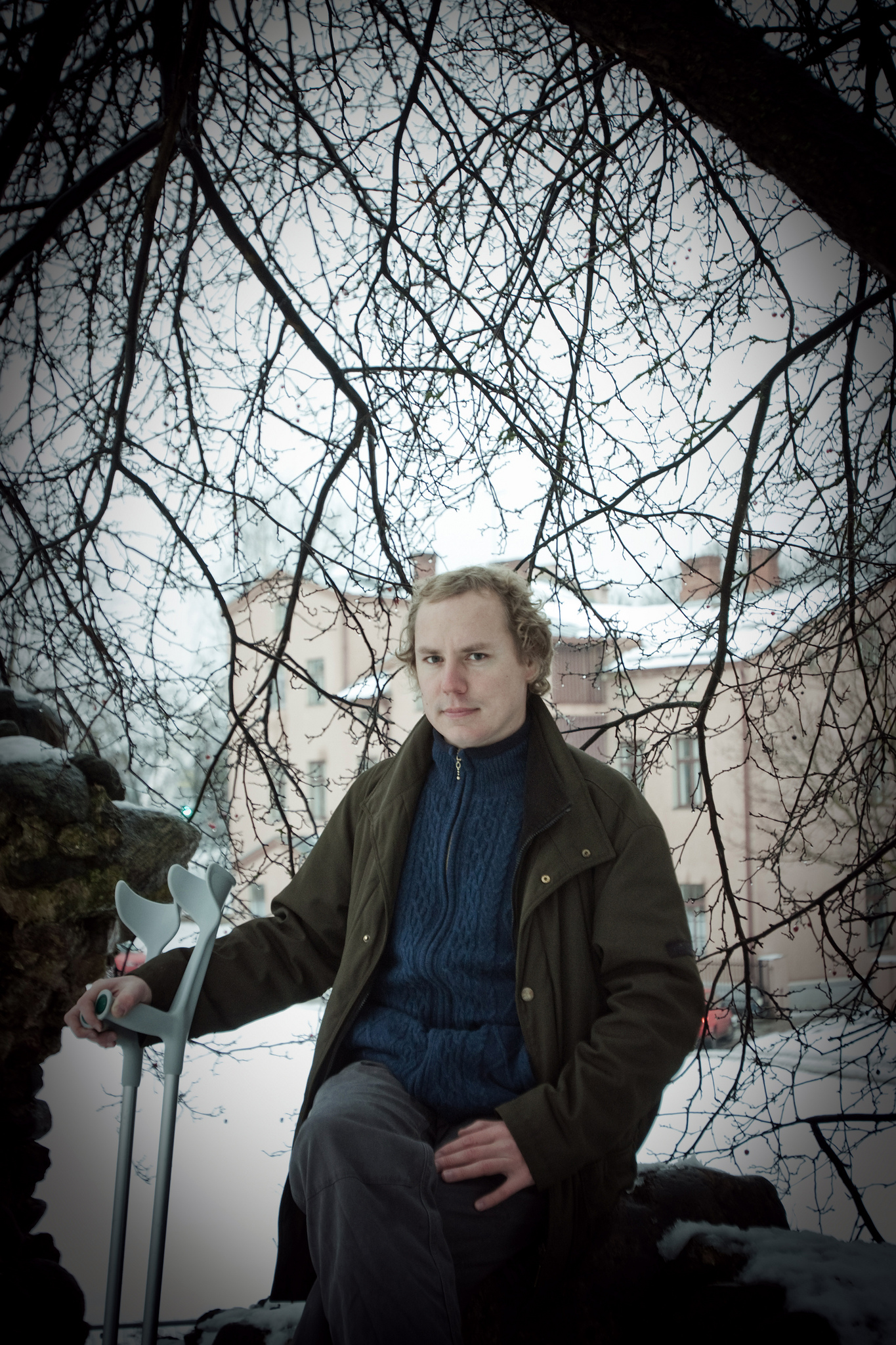 Loodusemees Jüri-Ott Salm Tartus, Magasini tänaval, 2010. aasta novembris.